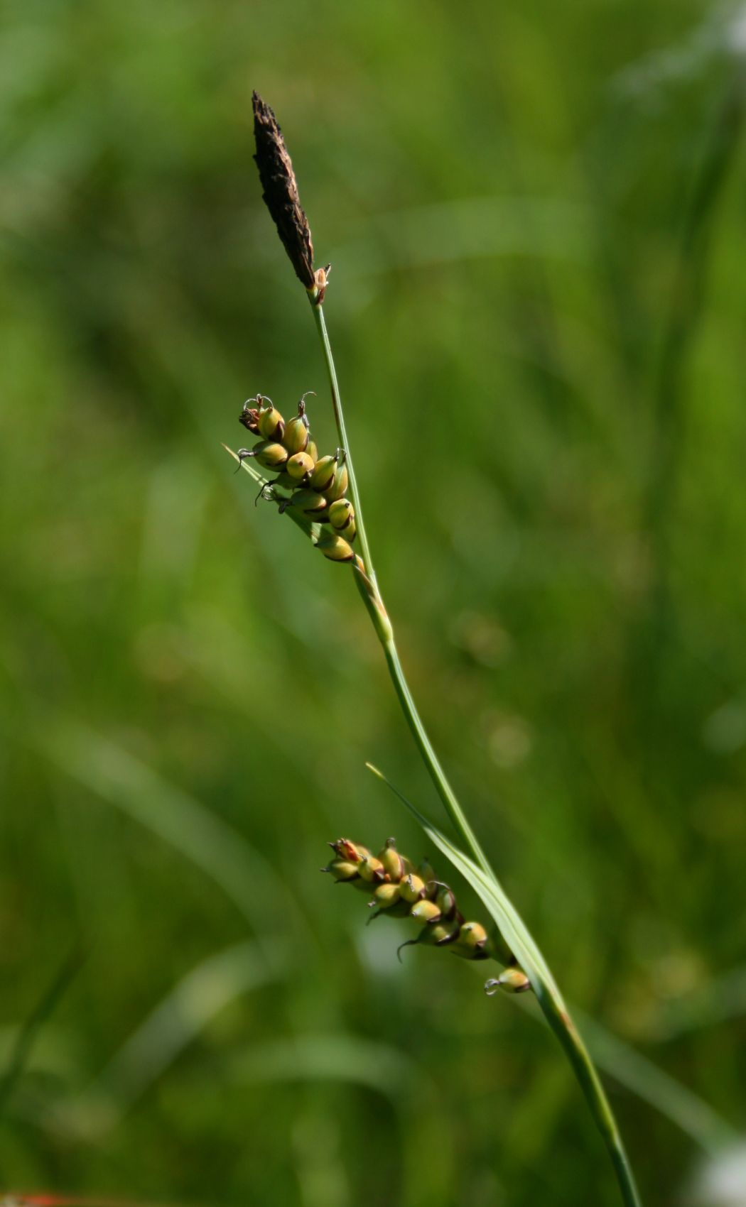 Hirse-Segge (Carex panicea), Sauergräser (Cyperaceae) - Österreich/Austria/Autriche: Oberösterreich, Hausruckviertel, Moorwiese ca. 2 km S Forsthaus Redltal, ca. 570 m s.m.